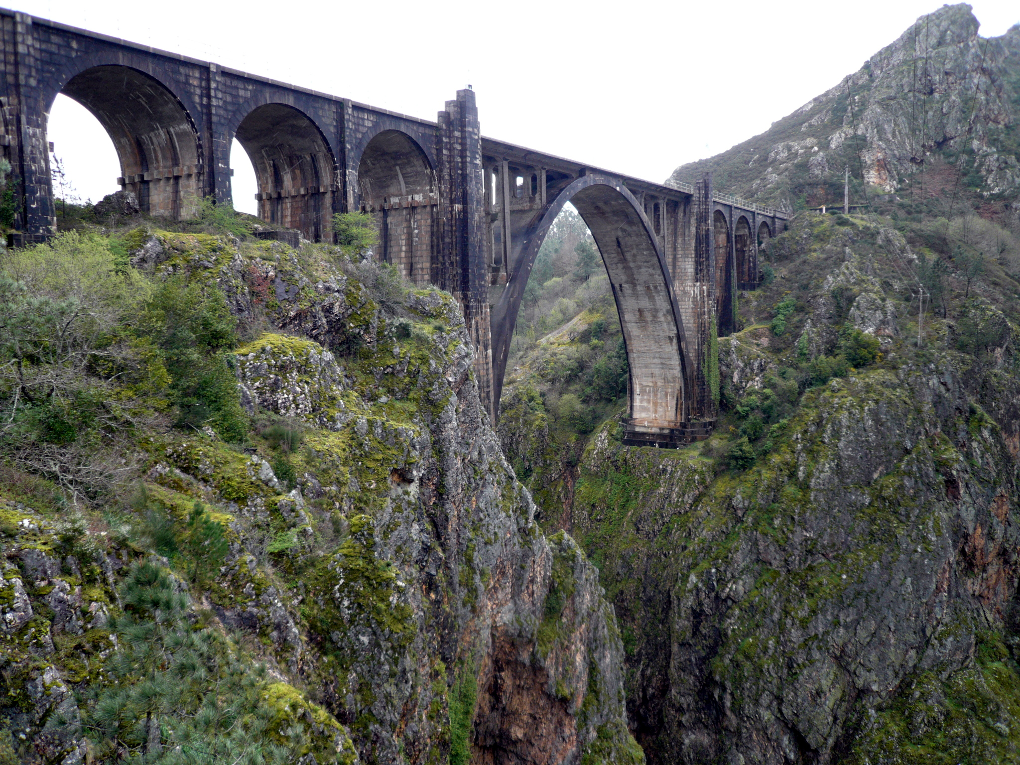 Puente de ferrocarril sobre el río Ulla rq